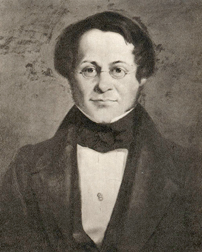 Carl Ulrik Sondén (1802-1875)